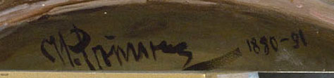 Signatur des Gemäldes Die Saporoger Kosaken schreiben dem türkischen Sultan einen Brief